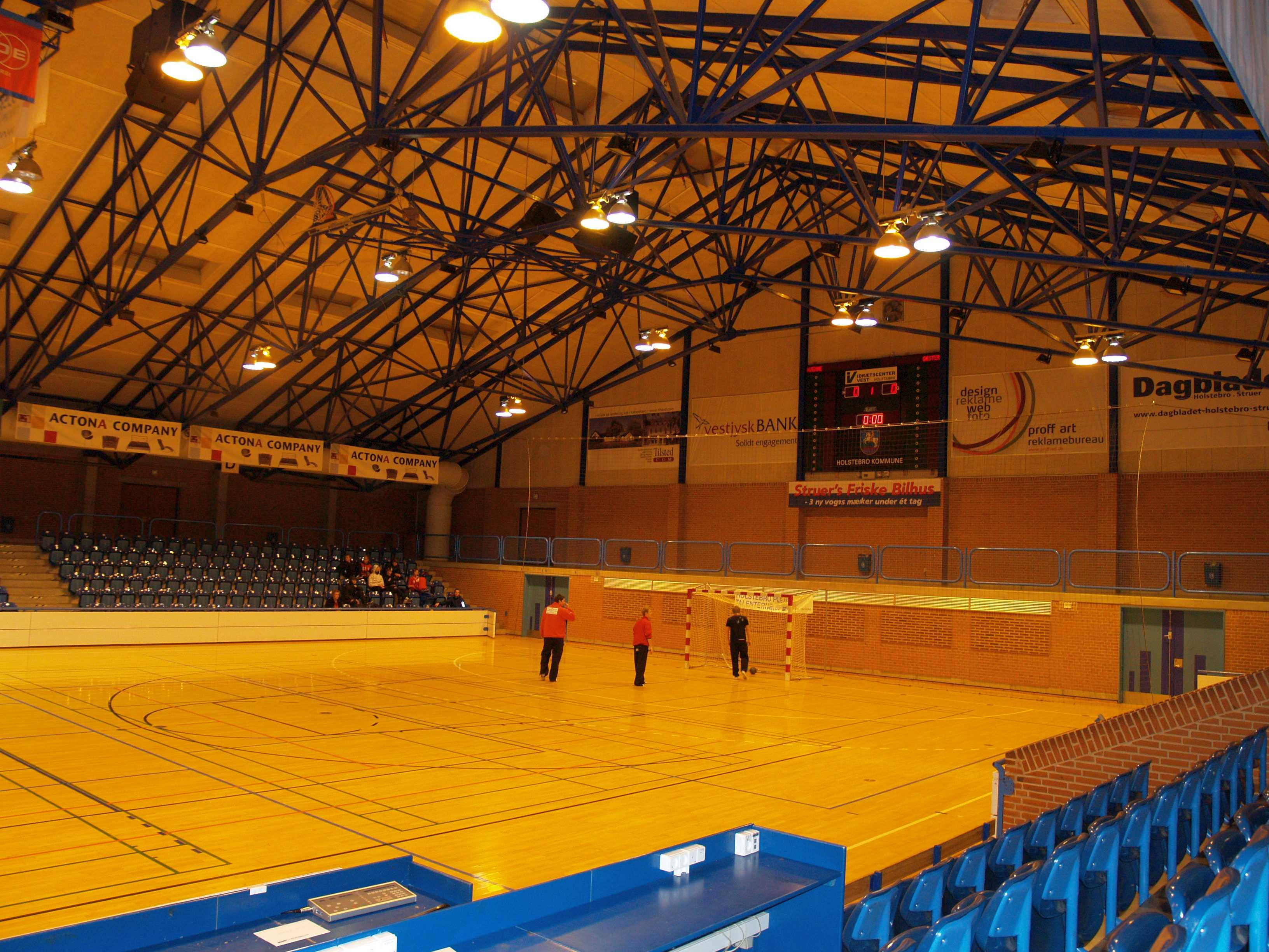 Idrætscenter Vest (Sportstätte in Holstebro, Dänemark)